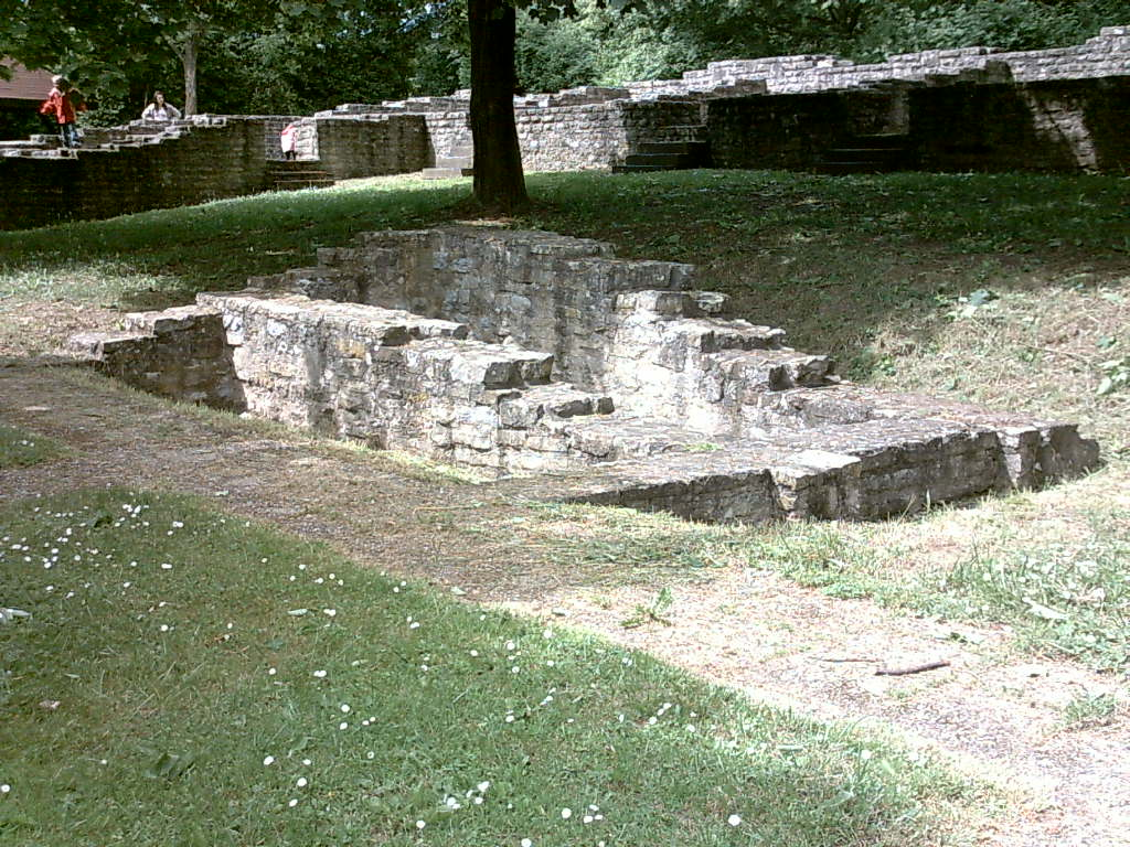 villa rustica bei Bad Rappenau-Zimmerhof von Süden aus gesehen